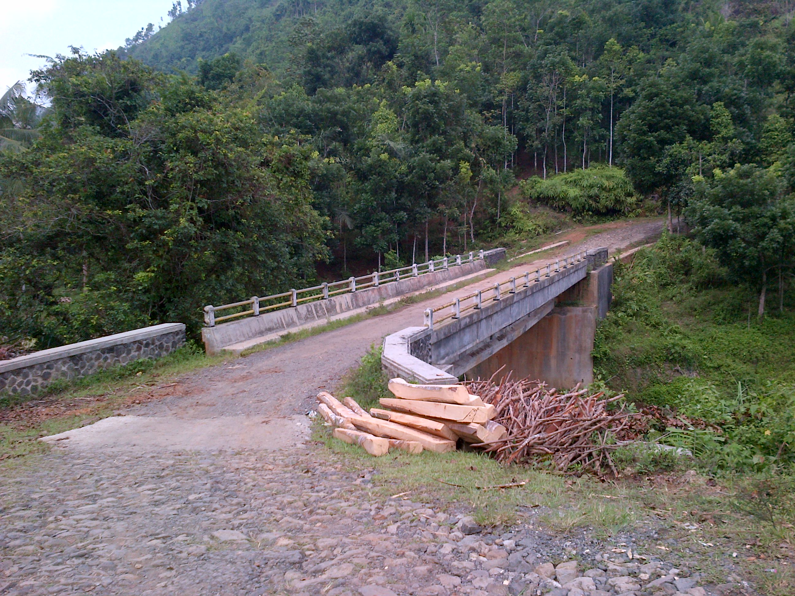 Jembatan CurugTelu Culamega,kab.Tasikmalaya 2014